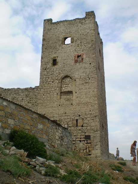 Genoese fortress (fragment)